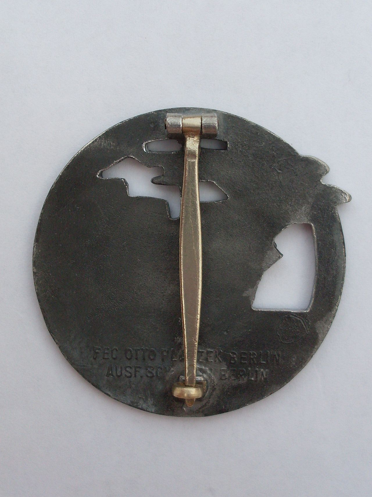 Blockadebrecherabzeichen hinten